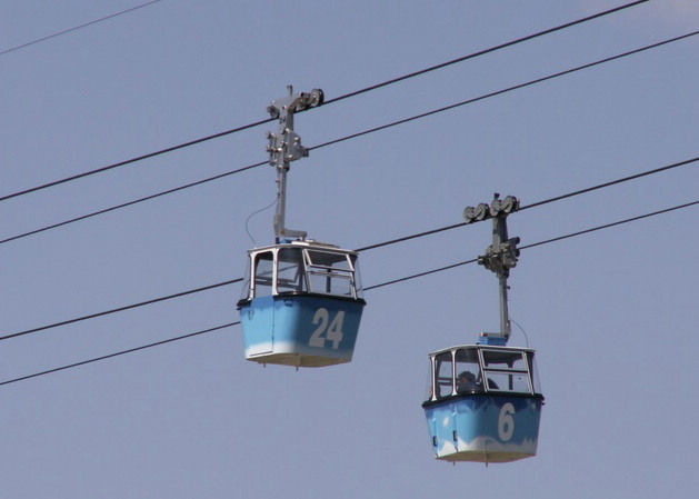 Cabinas del Teleférico de la Casa de Campo, Madrid.